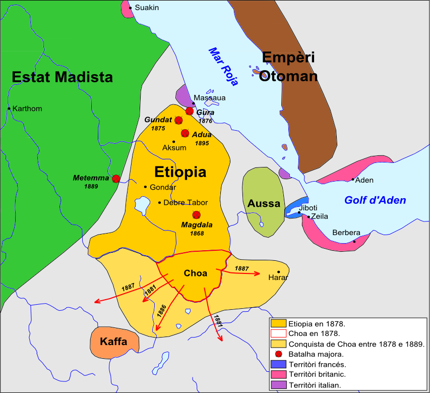 Etiopia en 1889 a la mòrt de Yohannes IV.